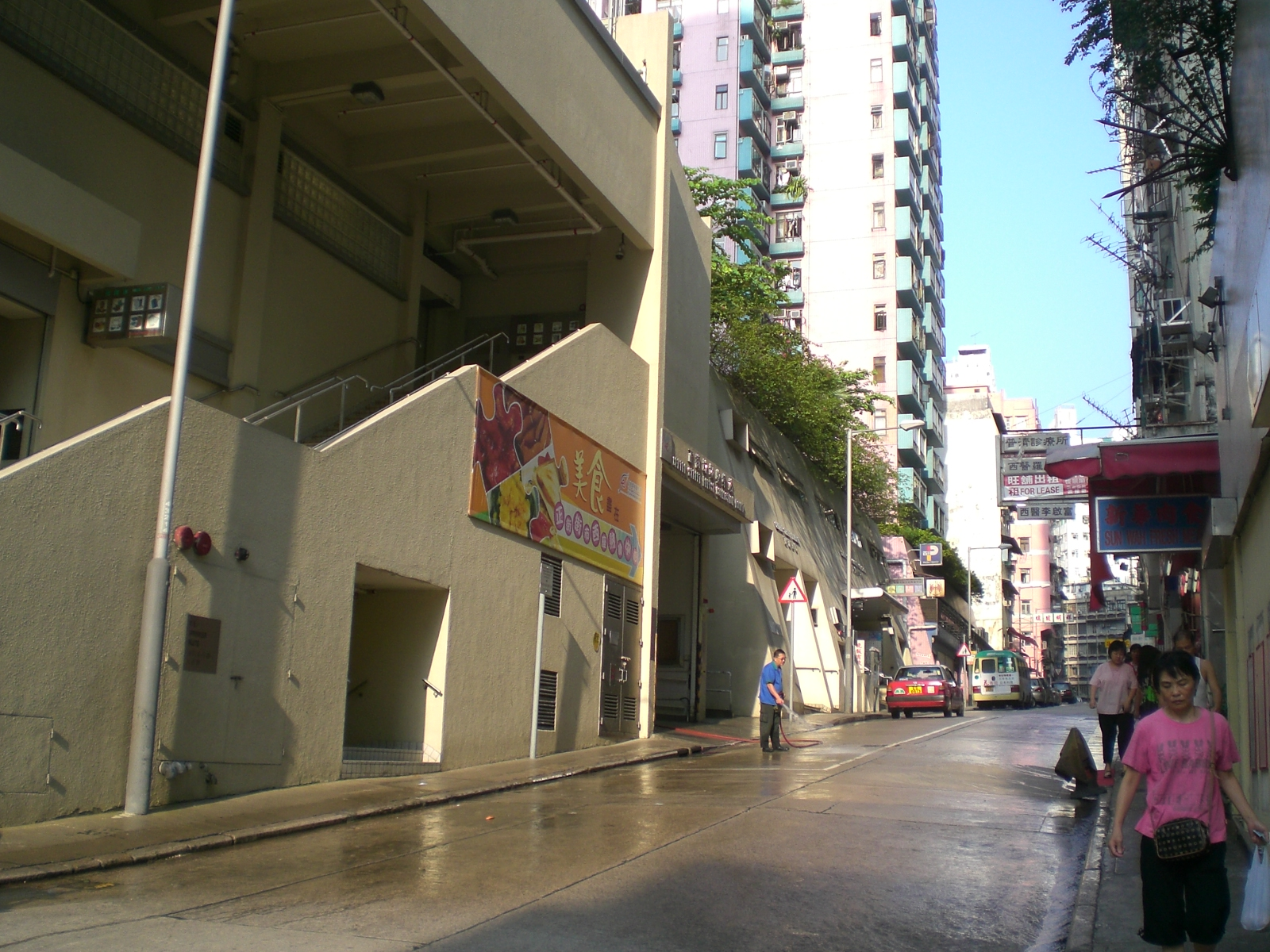 第一街, First Street, Sai Ying Pun, Hong Kong.